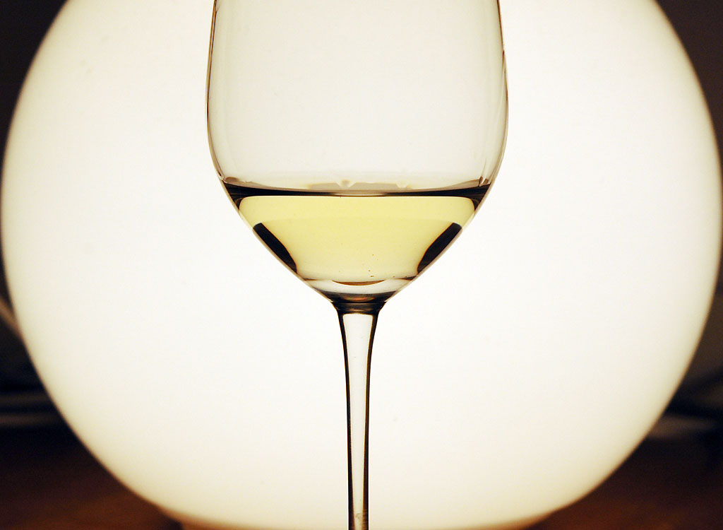 Vin blanc sec